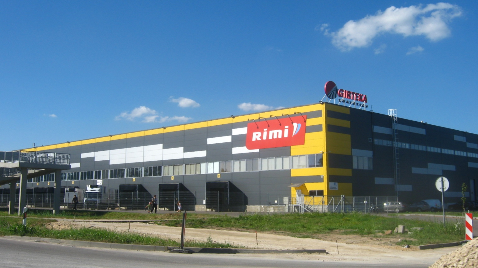 Vievis